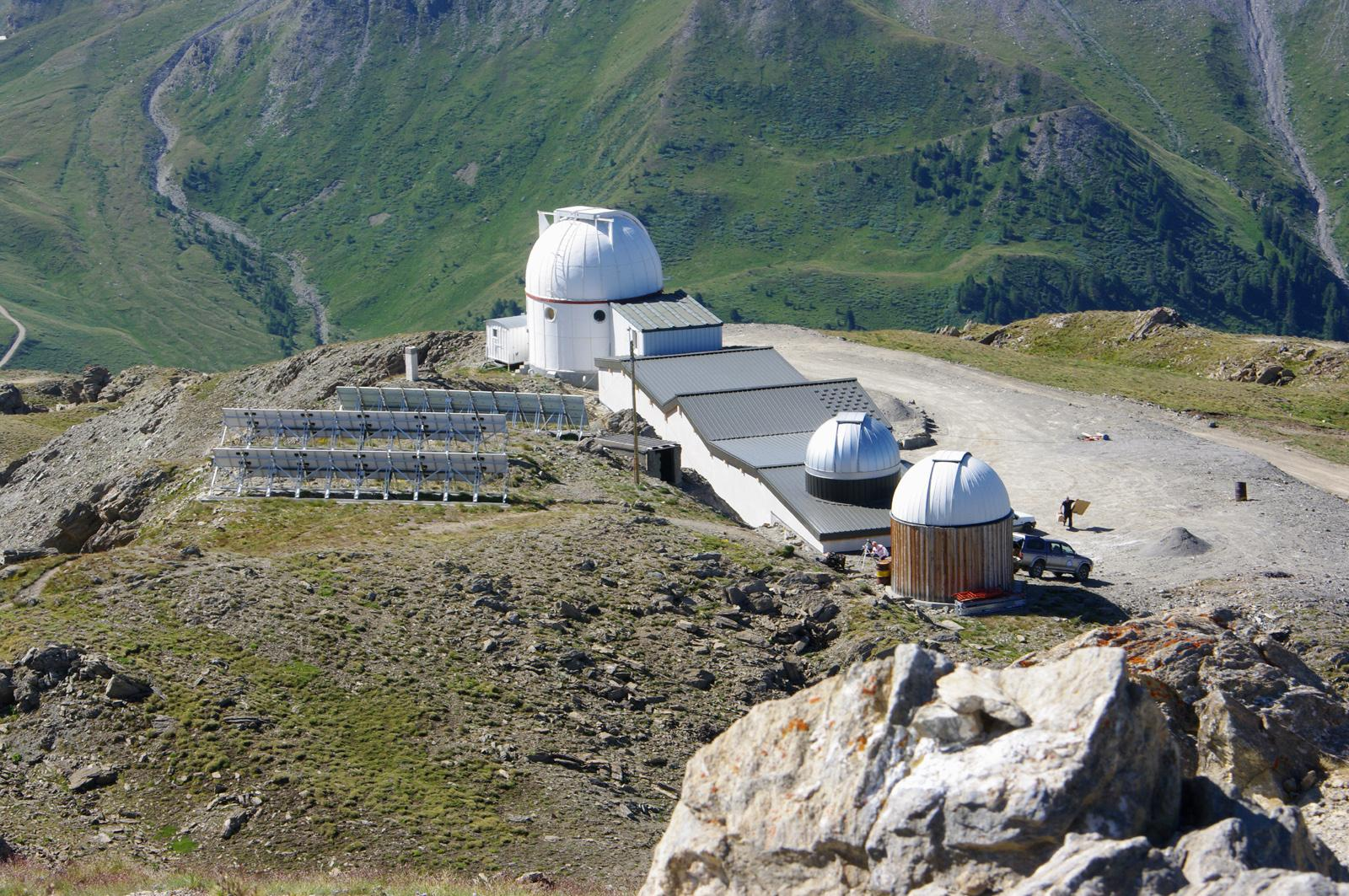 Observatoire du pic de Chateaurenard après sa rénovation en 2015 (vu depuis le pic de Chateaurenard)